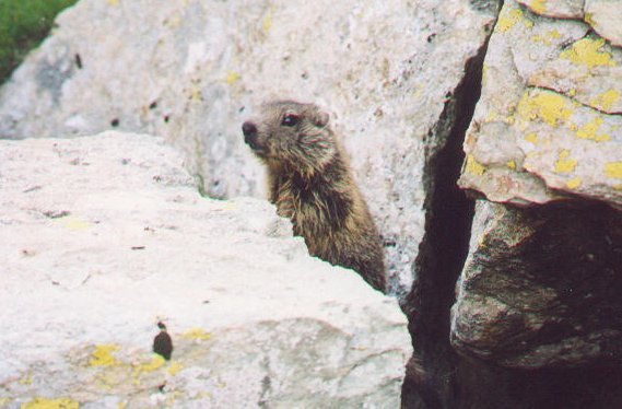 Marmotta fra le rocce